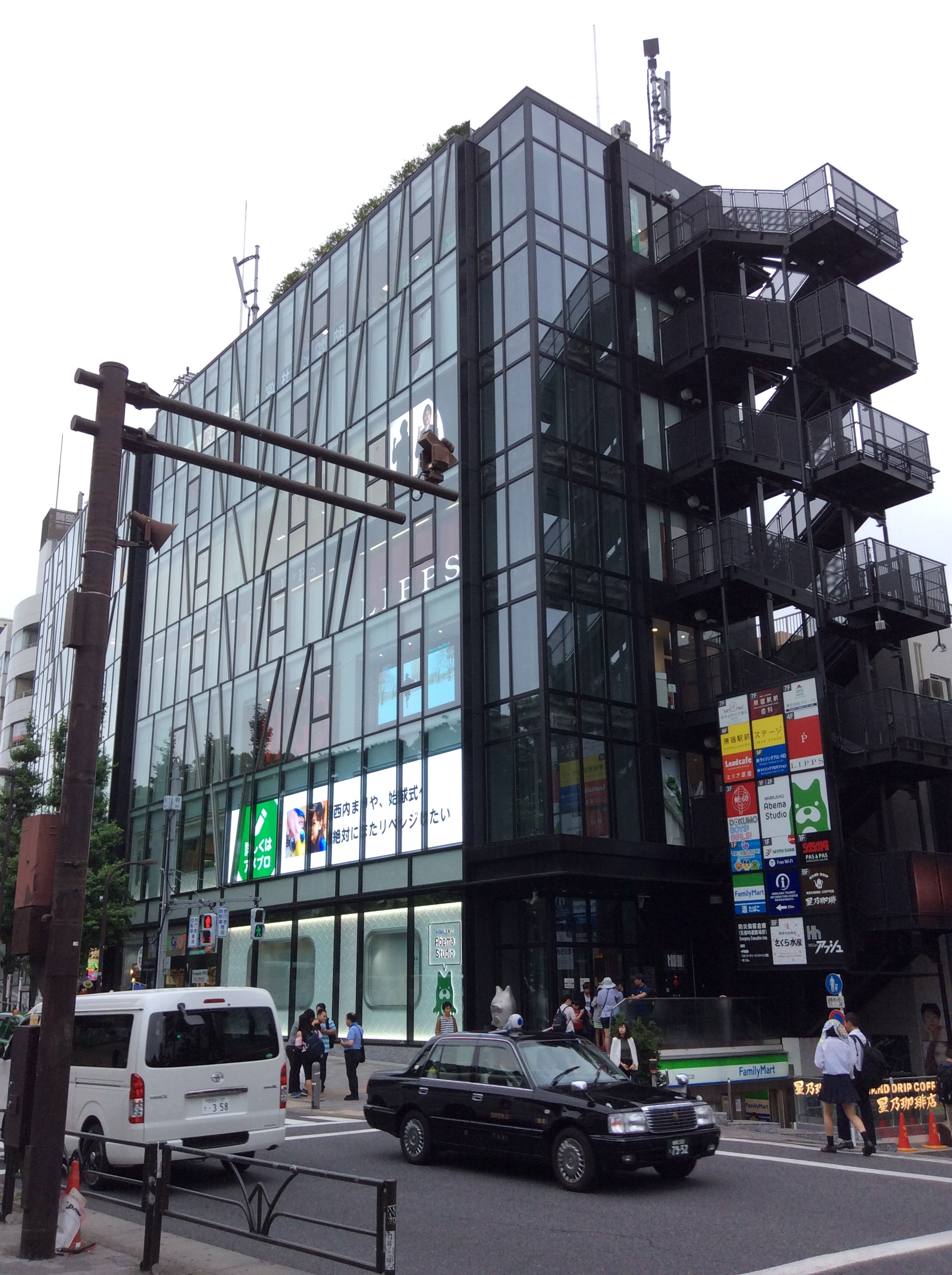 原宿駅前ステージ